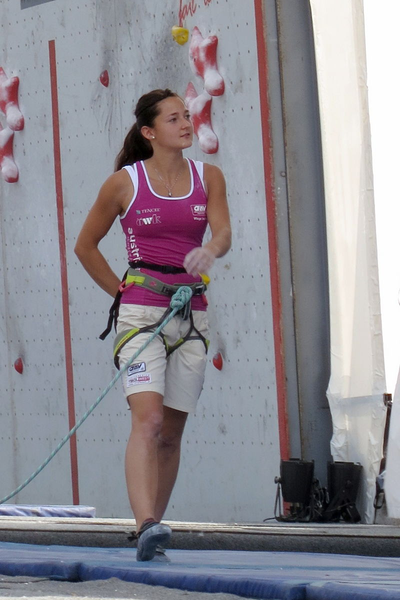 Magdalena Röck en demi-finale du championnat d'Europe d'escalade (difficulté) 2013 à Chamonix